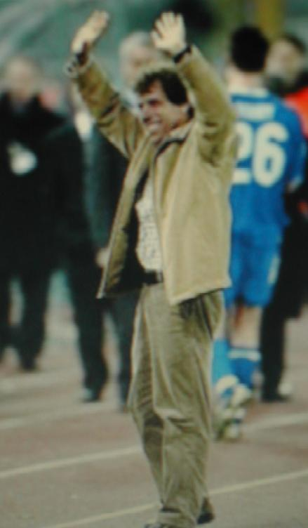 Photo of Gianfranco Zola